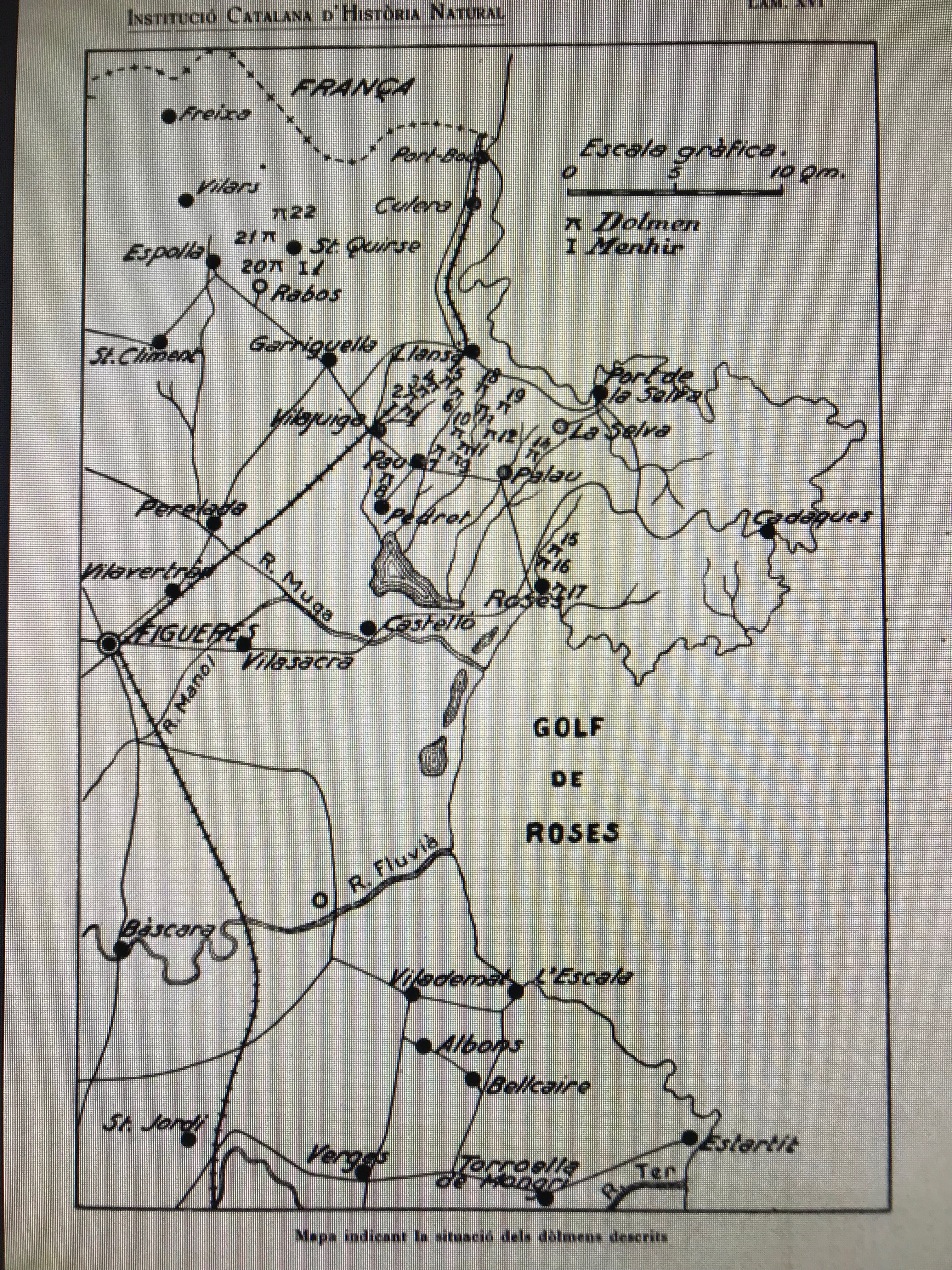 Mapa descriptiu dels dolmens estudiats per Isidre Macau al seu llibre Nous monuments megalítics de l'Alt Empordà i l'Abric Neolític de la Cova de Can Simon